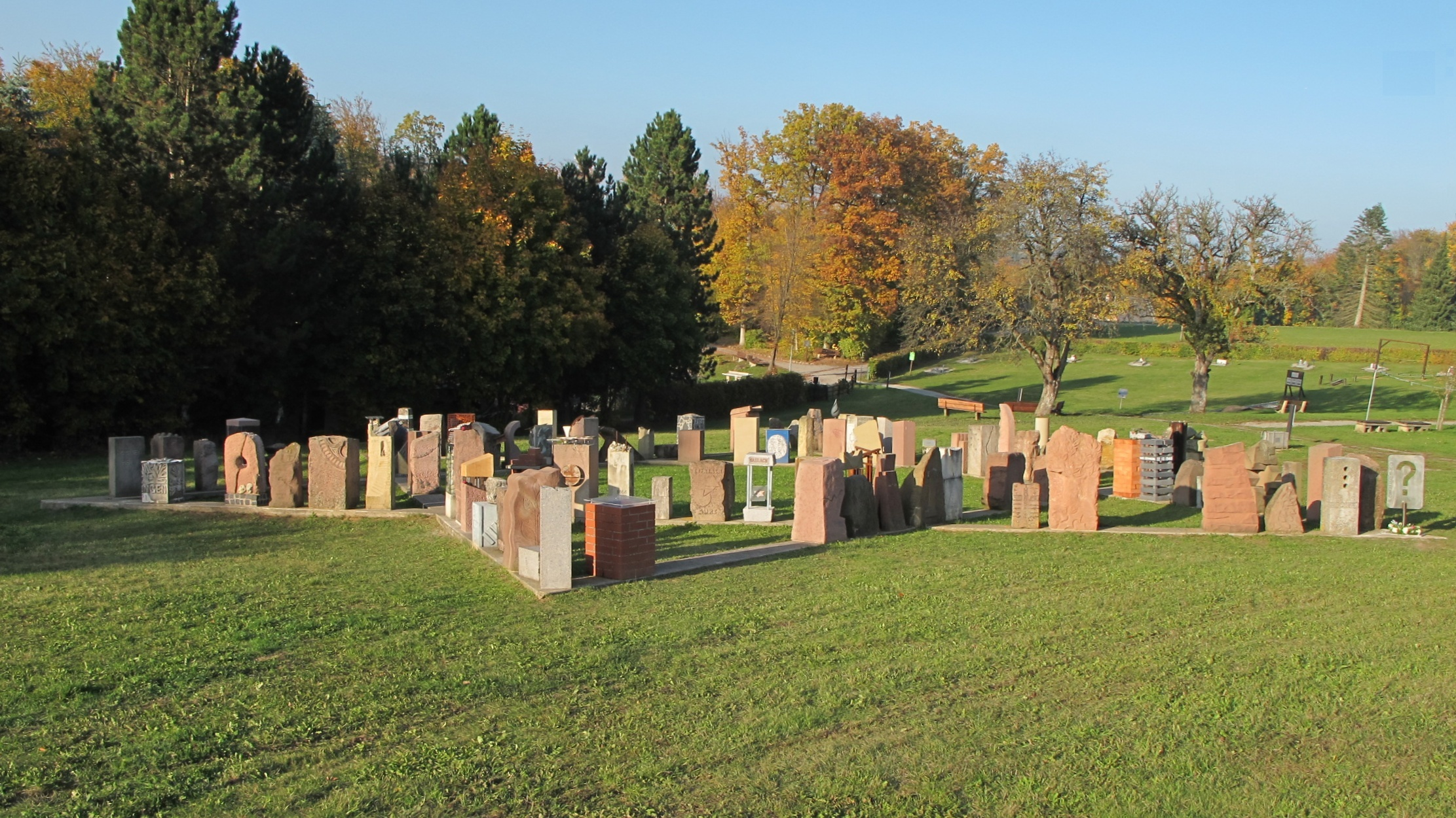 Zentraler Teil des Mahnmals Neckarzimmern für die im Jahr 1940 deportierten Juden der Region; zentrale Bodenskulptur auf dem Gelände der Tagungsstätte der Evangelischen Jugend in Neckarzimmern; entstanden im Rahmen des "Ökumenischen Jugendprojekts Mahnmal"